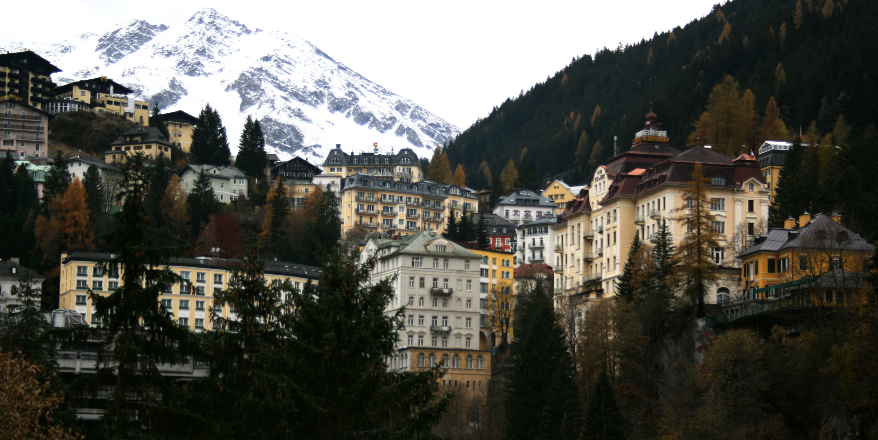 Blick in den Ort Bad Gastein im Gasteinertal